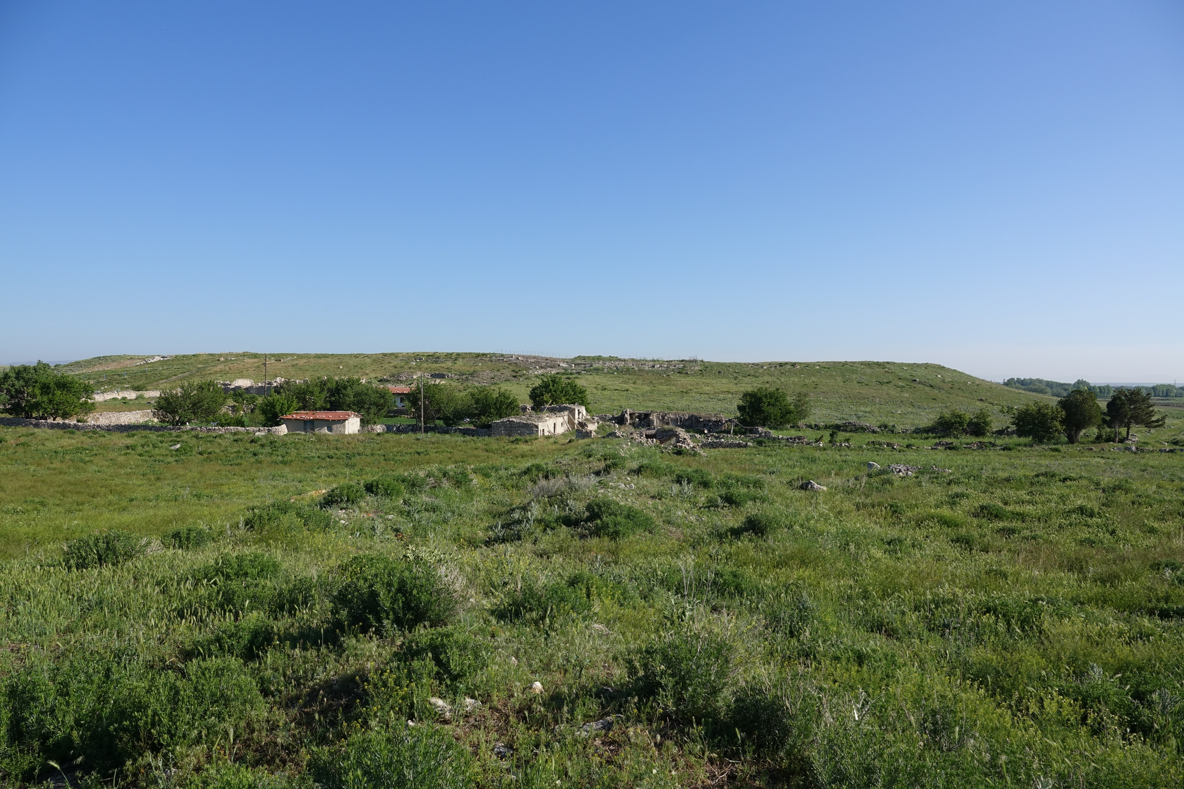 Blick auf die verschüttete Oberstadt